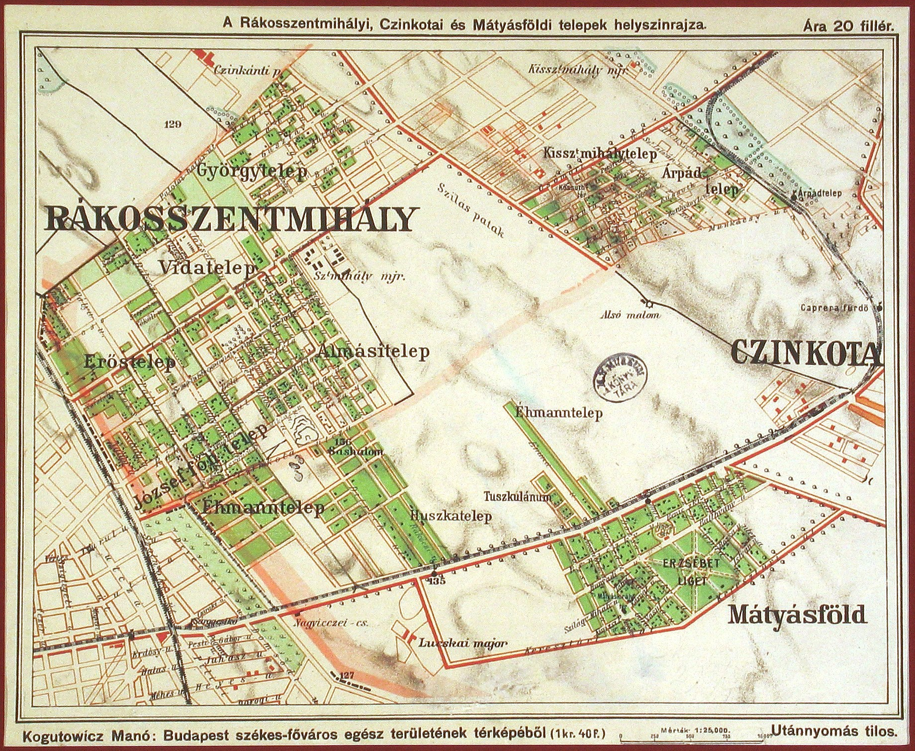 Rákosszentmihály, Cinkota, Mátyásföld telepeinek helyszínrajza Kogutowicz Manó 'Budapest székes-főváros egész területének térképé'ből, 1912